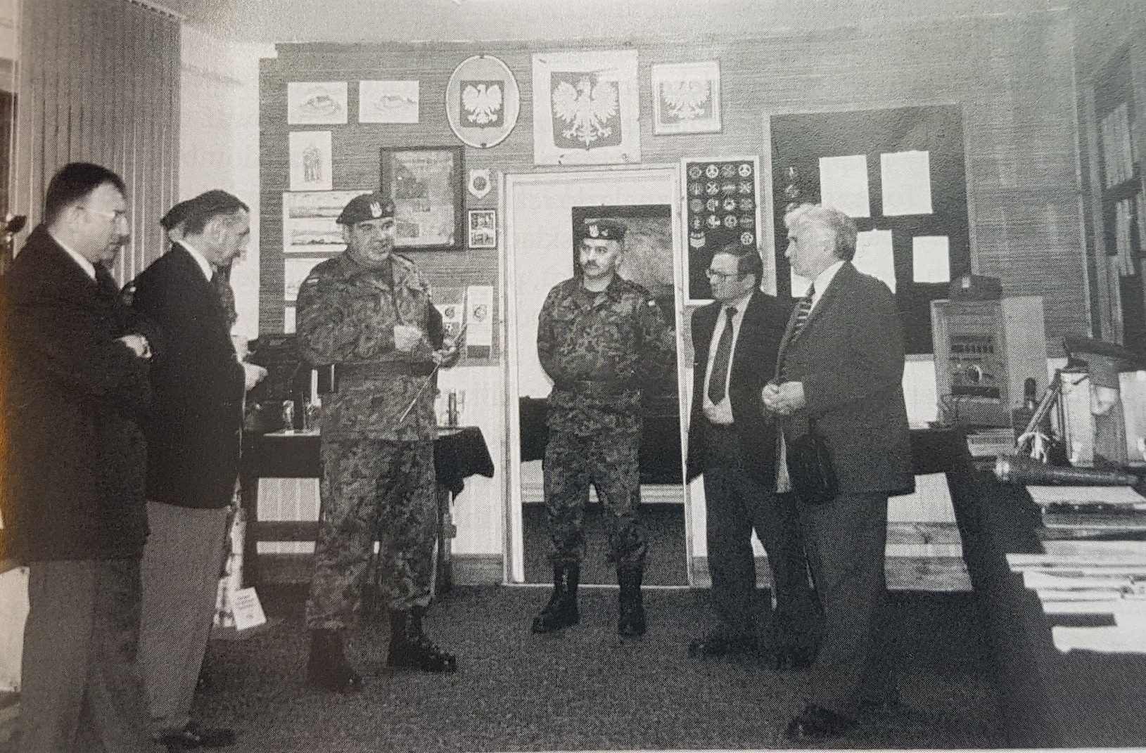 Drawno. Sala Tradycji 7 OSSiMW